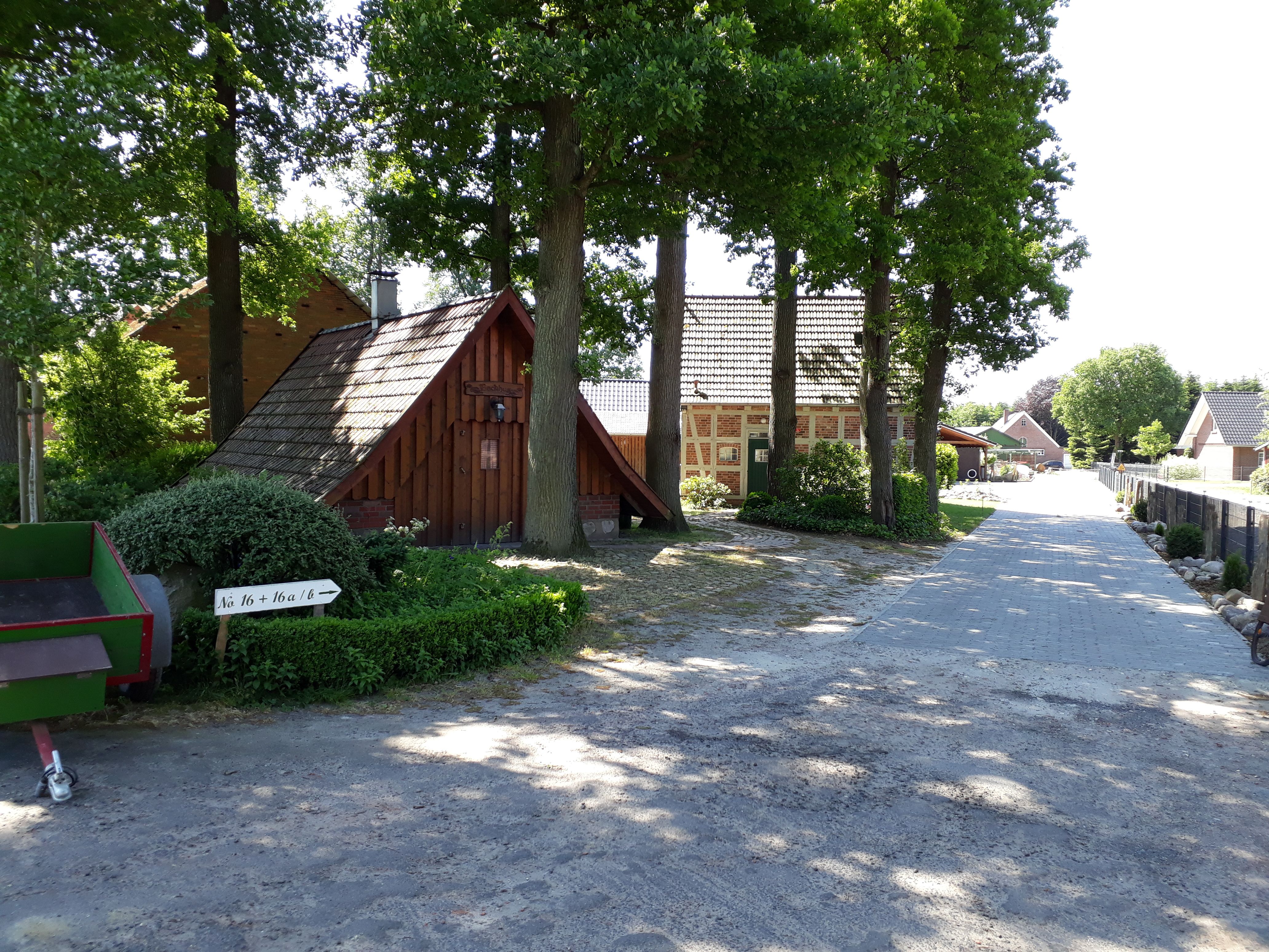 Backhaus in Ahlerstedt, Landkreis Stade, Niedersachsen.